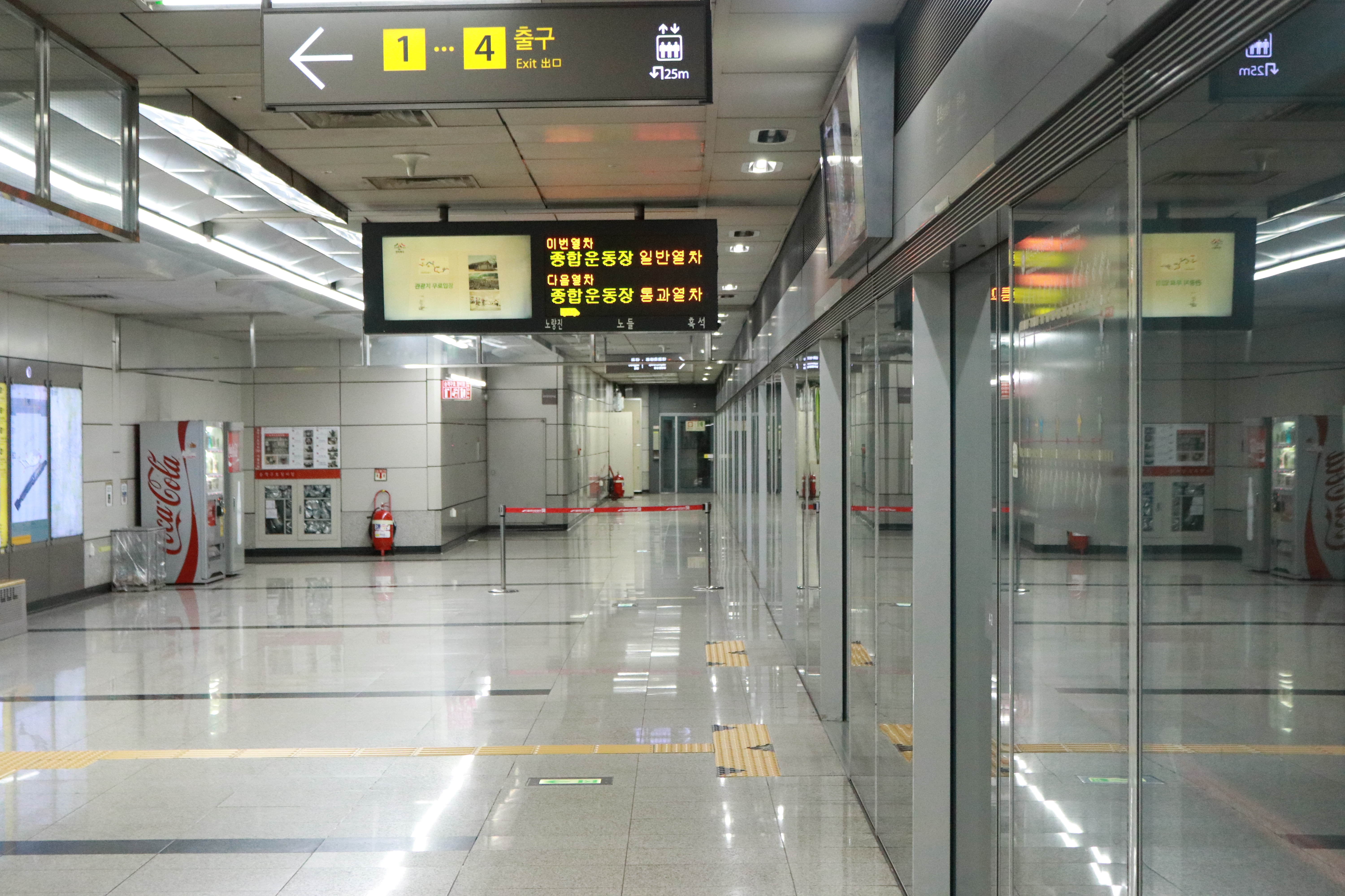 흑석역 승강장